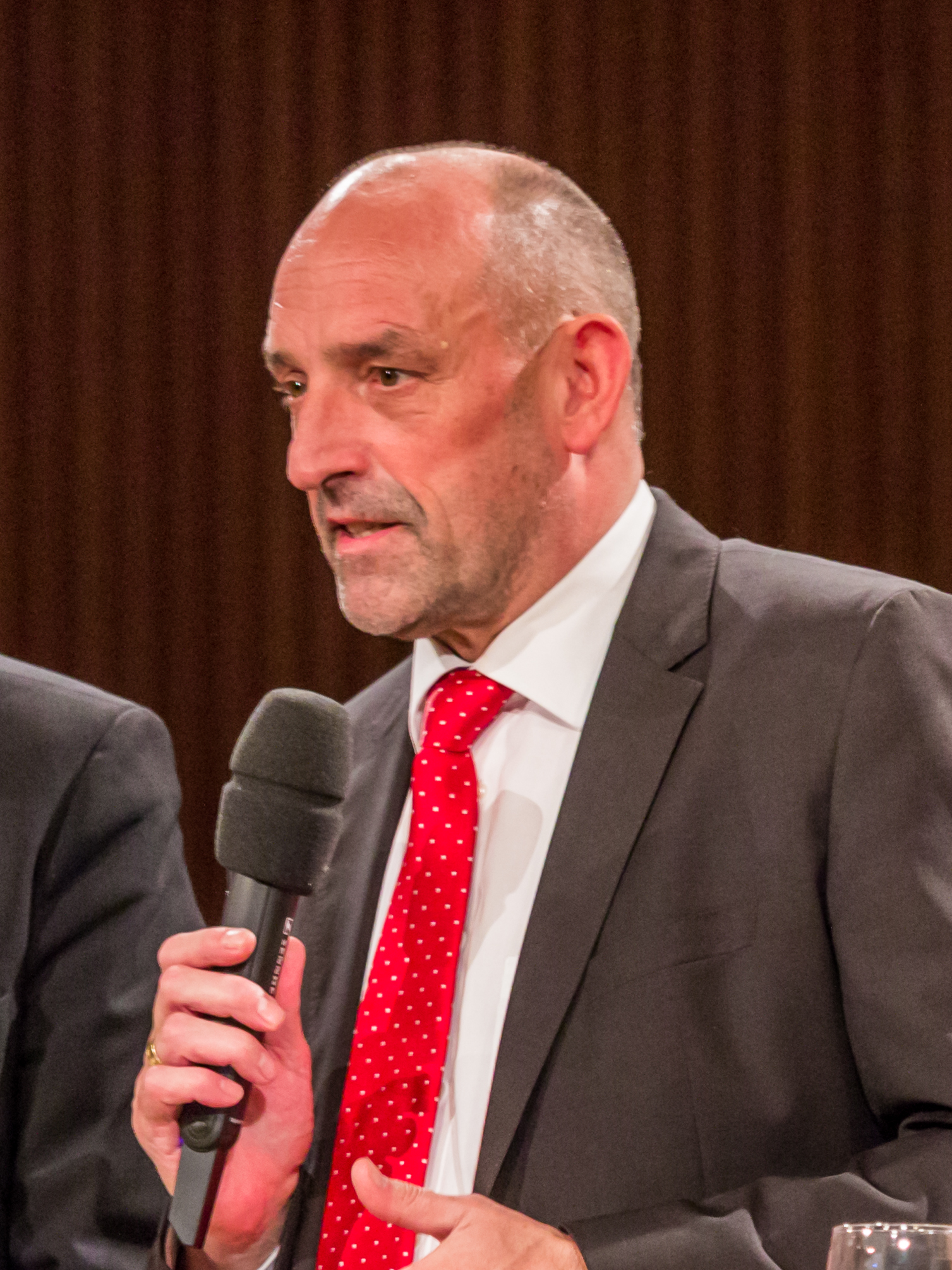 WDR Integrationsgipfel 2016. Panel: „Wie schaffen wir es?“ Teilnehmer: Detlef Scheele, Vorstandsmitglied Bundesagentur für Arbeit, Nürnberg